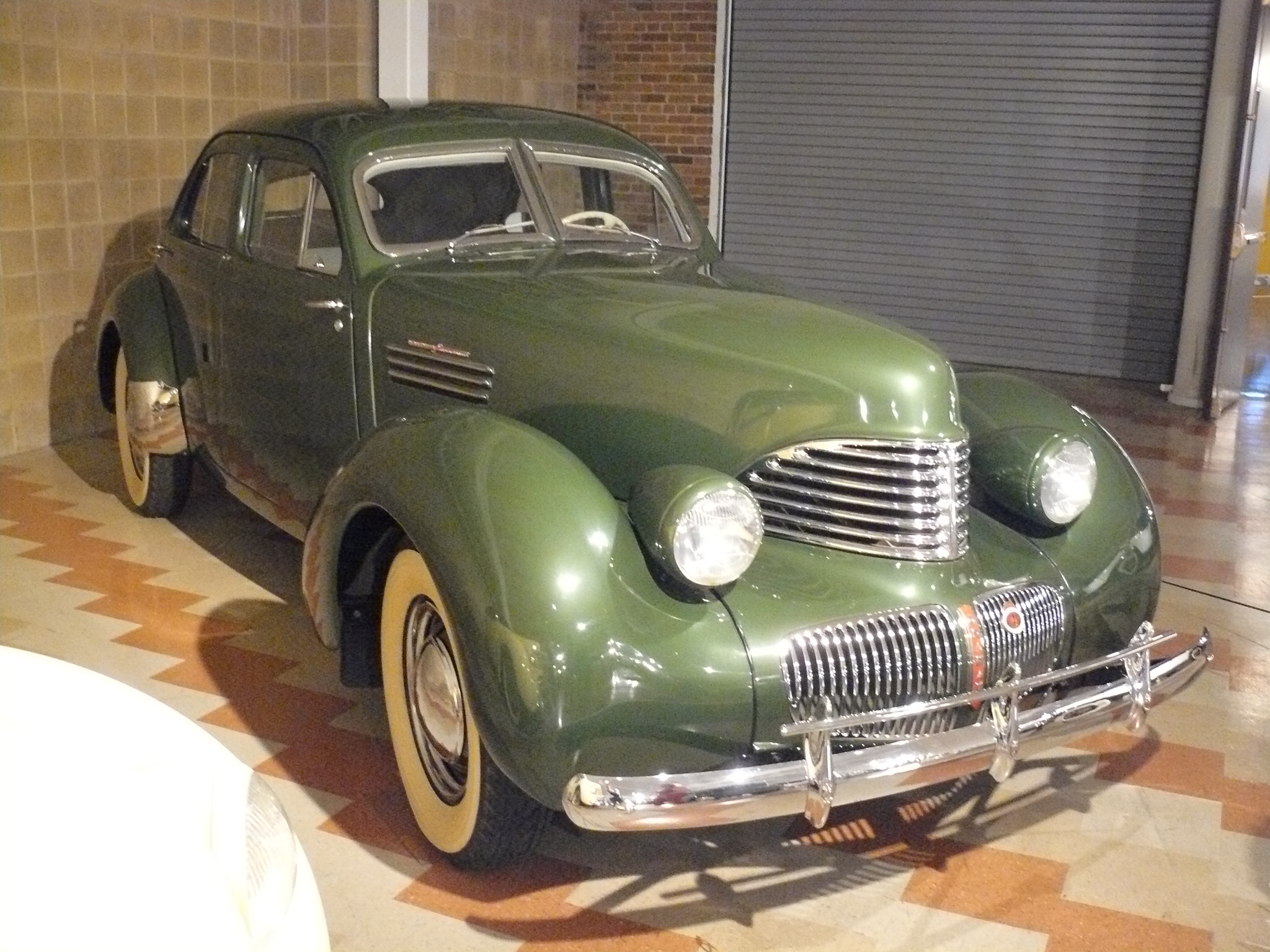 Auburn Muséum 2013.